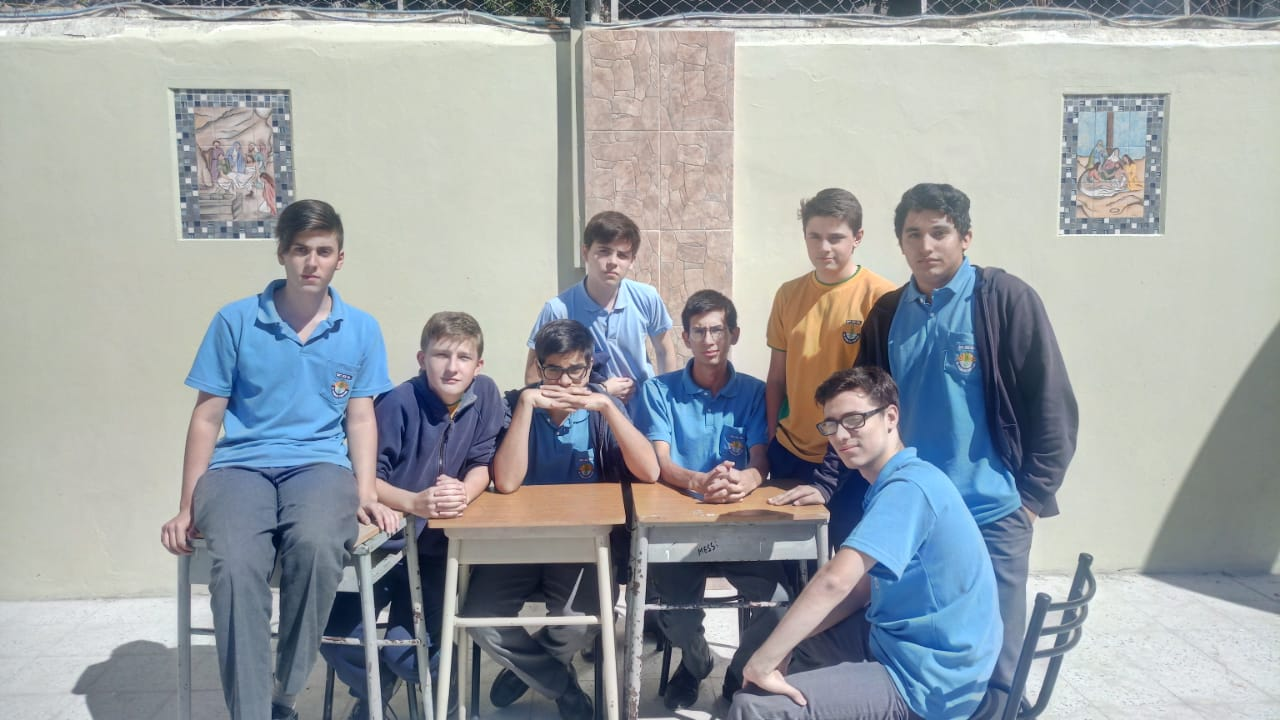 Imagen que representa al actual centro de estudiantes del Instituto Social Militar Dr. Dámaso Centeno